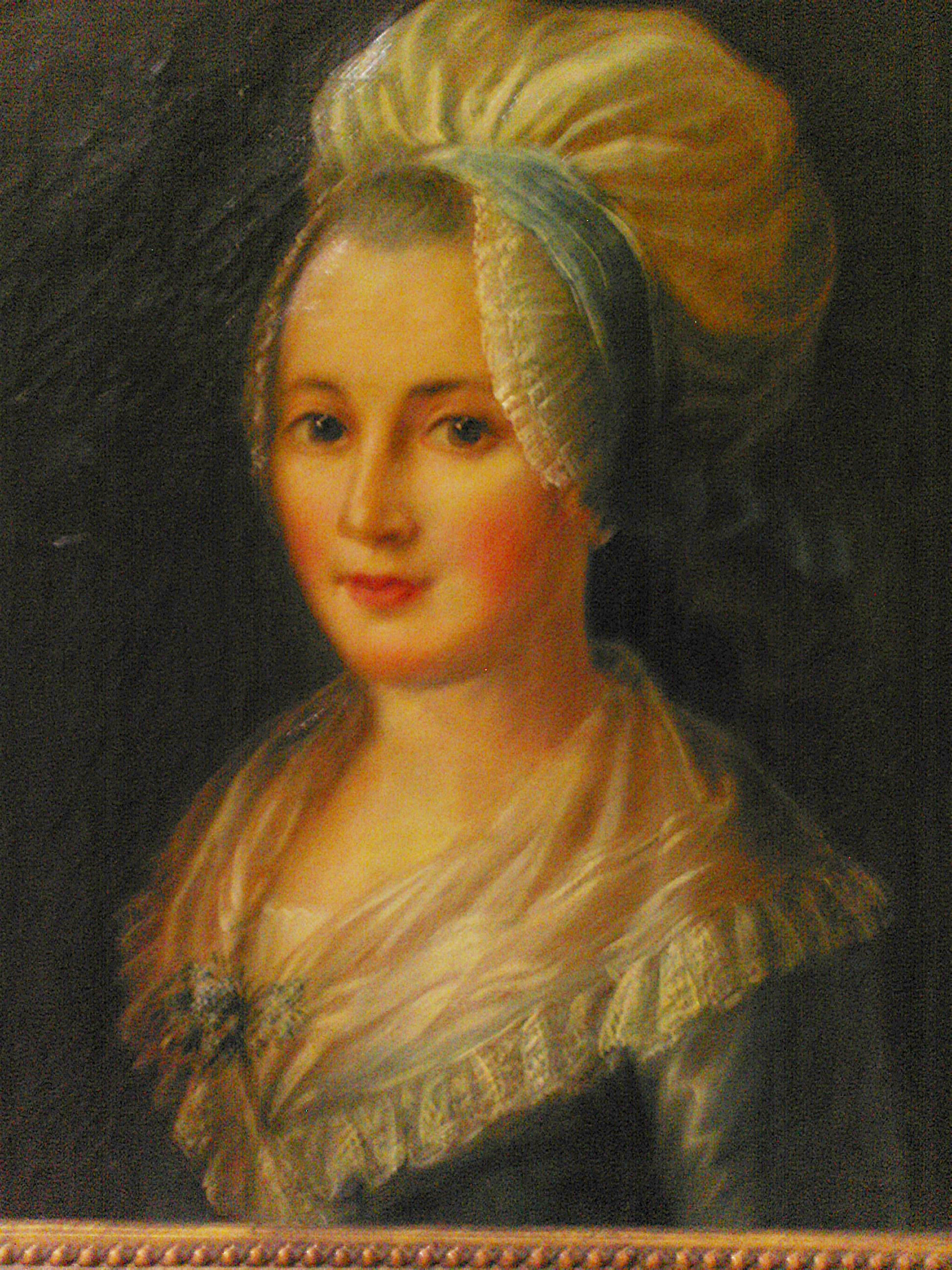 Johann Adam Schlesinger, selbst gefertigtes Bildnis seiner Frau, um 1790